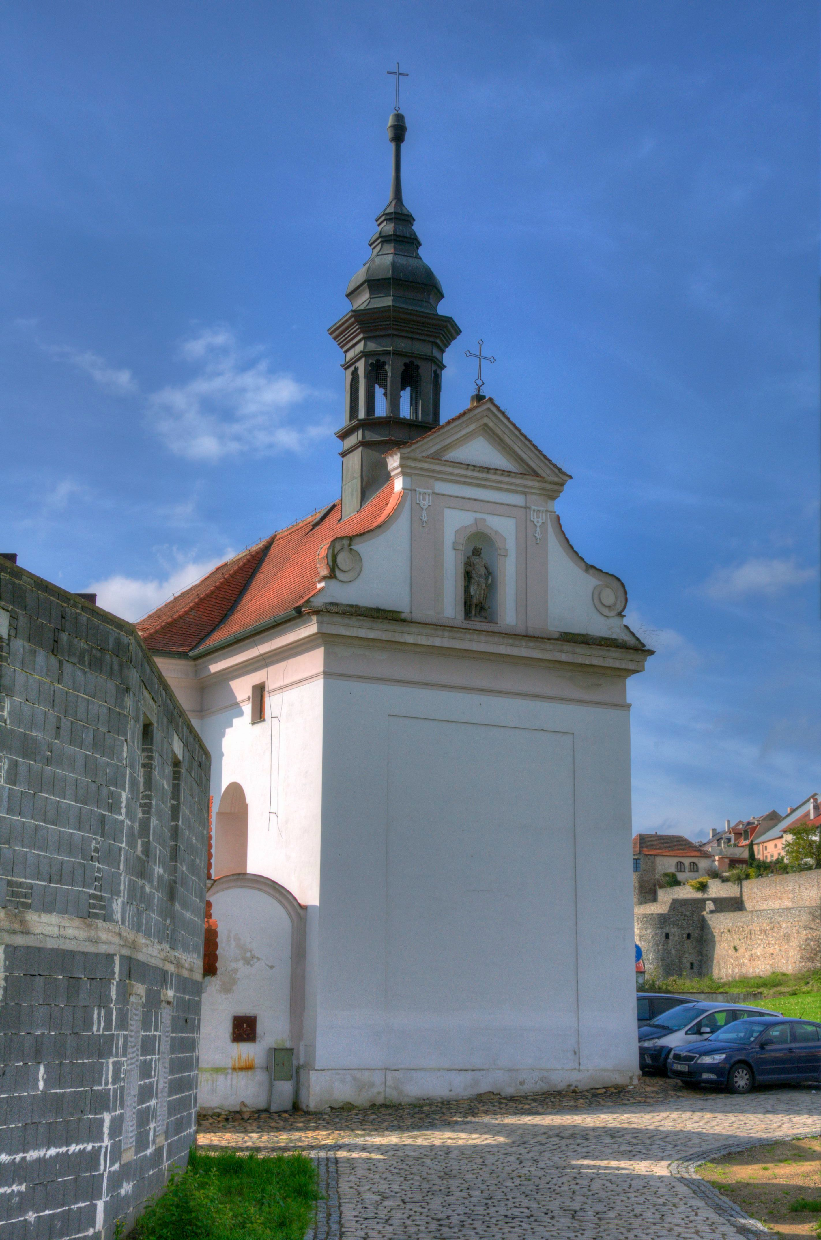 Kostel Stětí svatého Jana Křtitele, Říční, Kadaň.